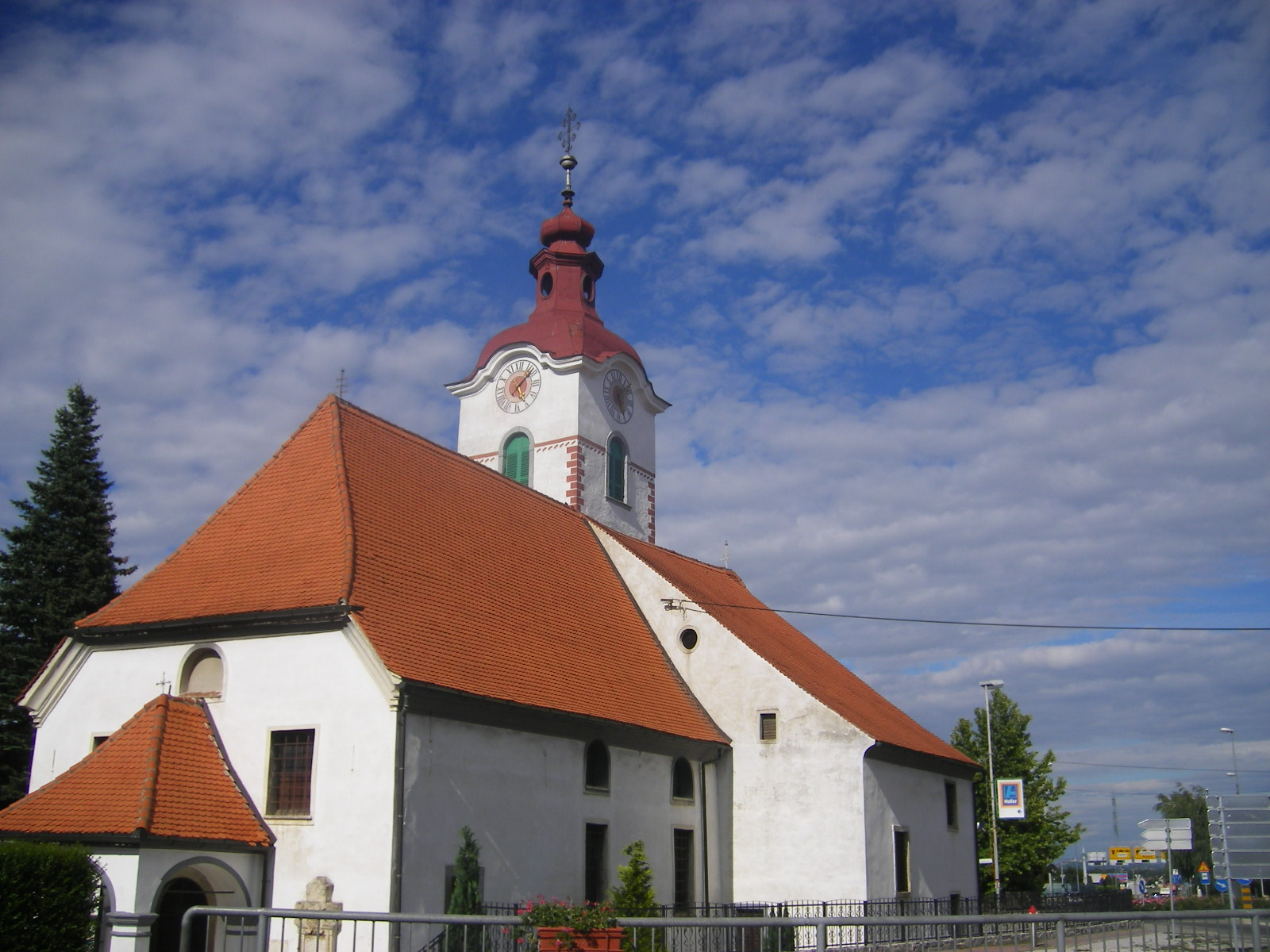 Spodnje Hoče